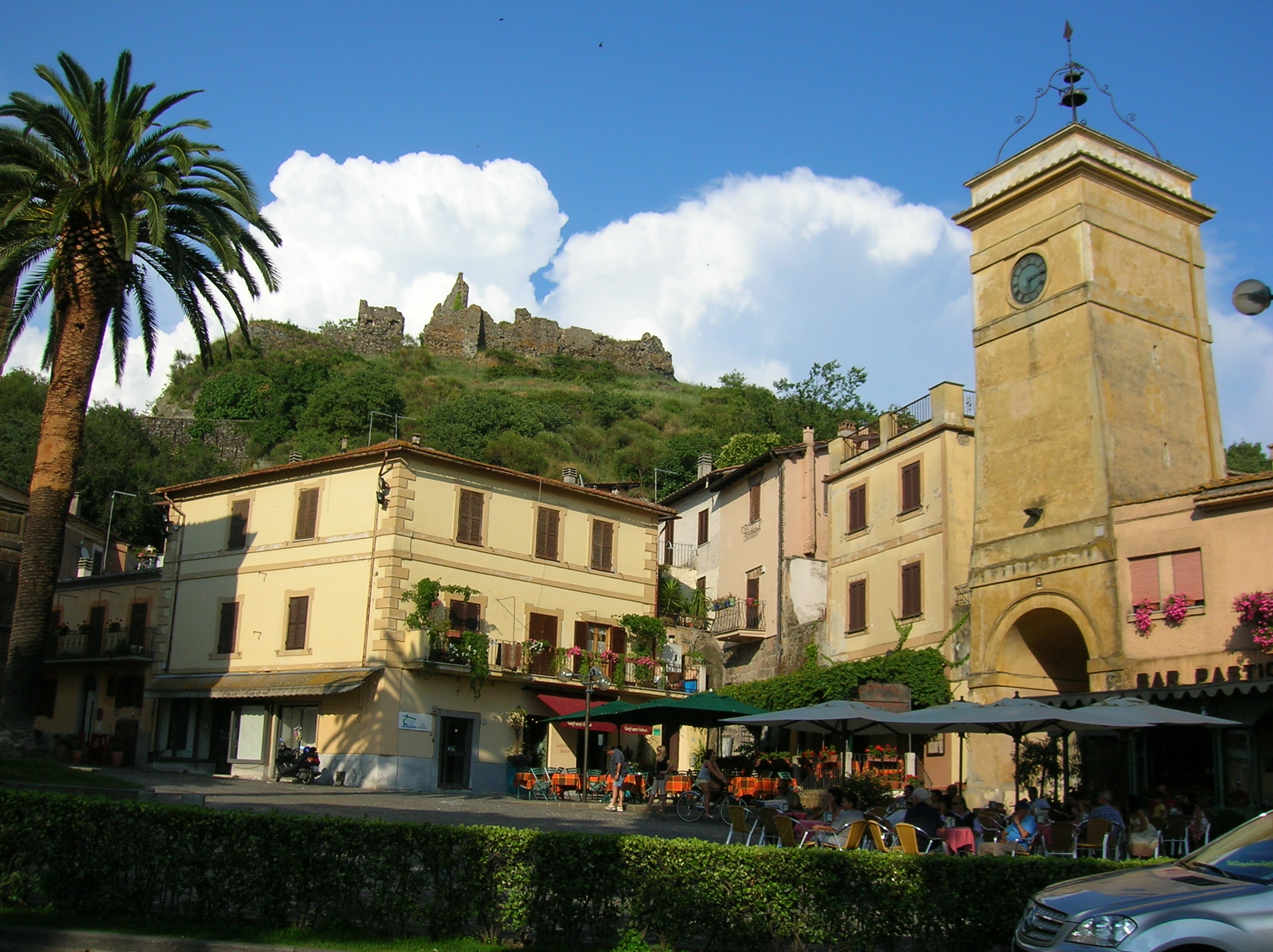 Piazza Vittorio Emanuele III a Trevignano Romano (Roma), Italia